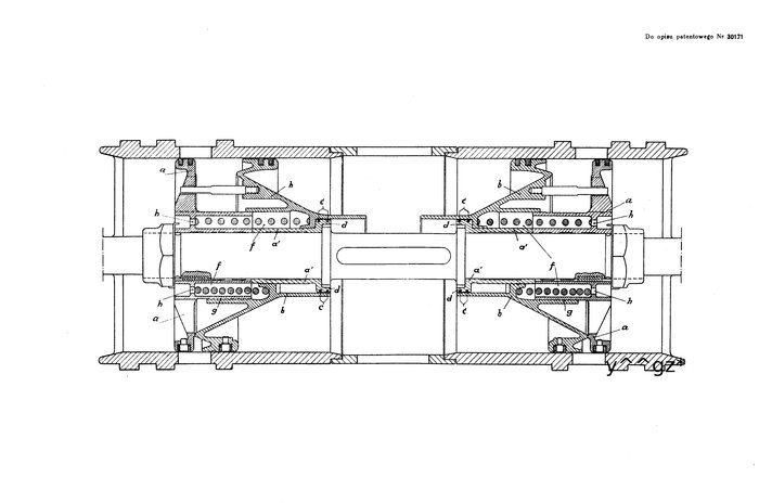 Wyrównywacze ciśnienie - suwaki Nikolai